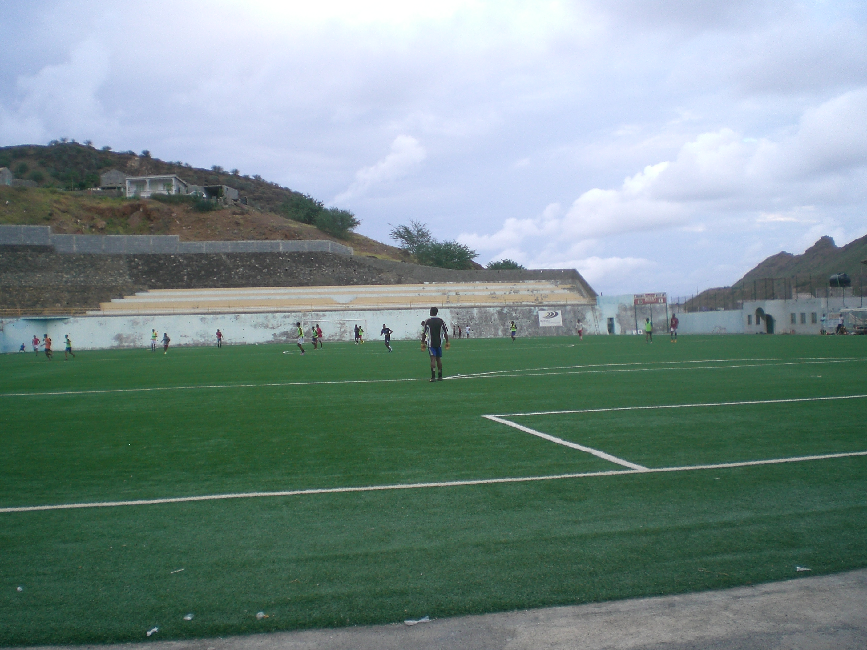 Estadio Municipal di Deus